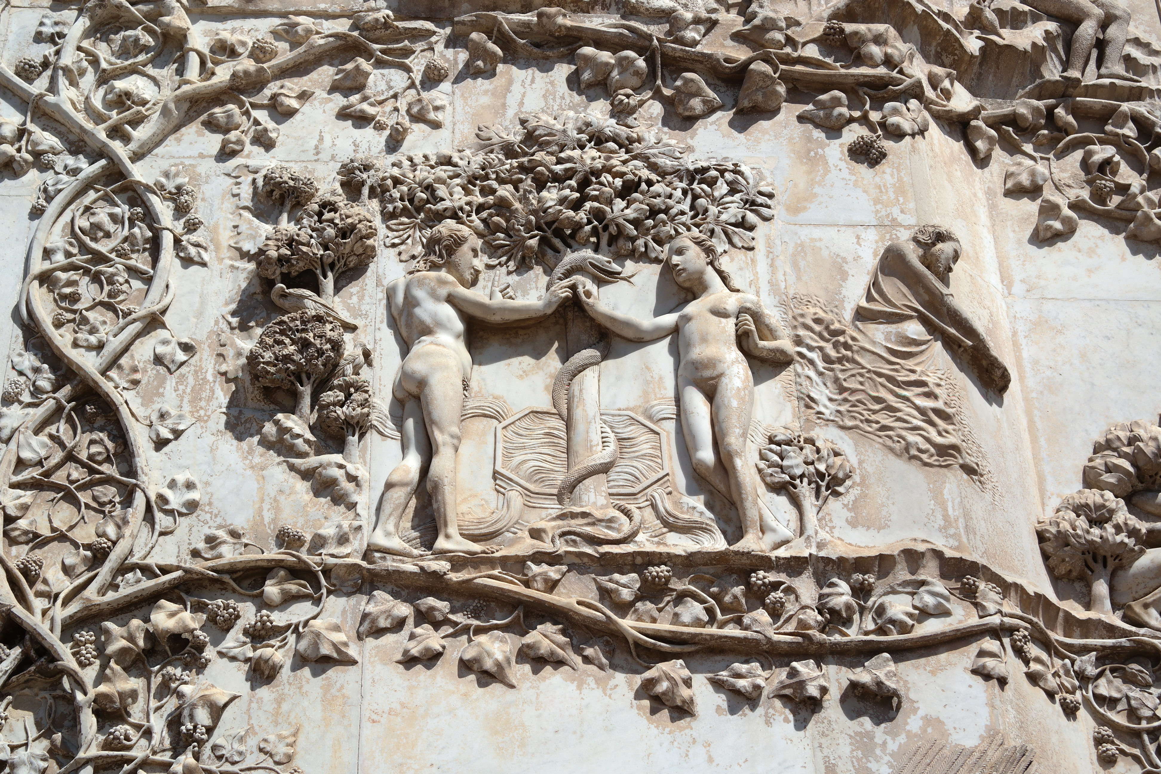 Pilastro esterno sinistro del Duomo di Orvieto: dettaglio del Peccato Originale